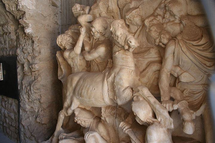 Bildhauerei in Ephesos